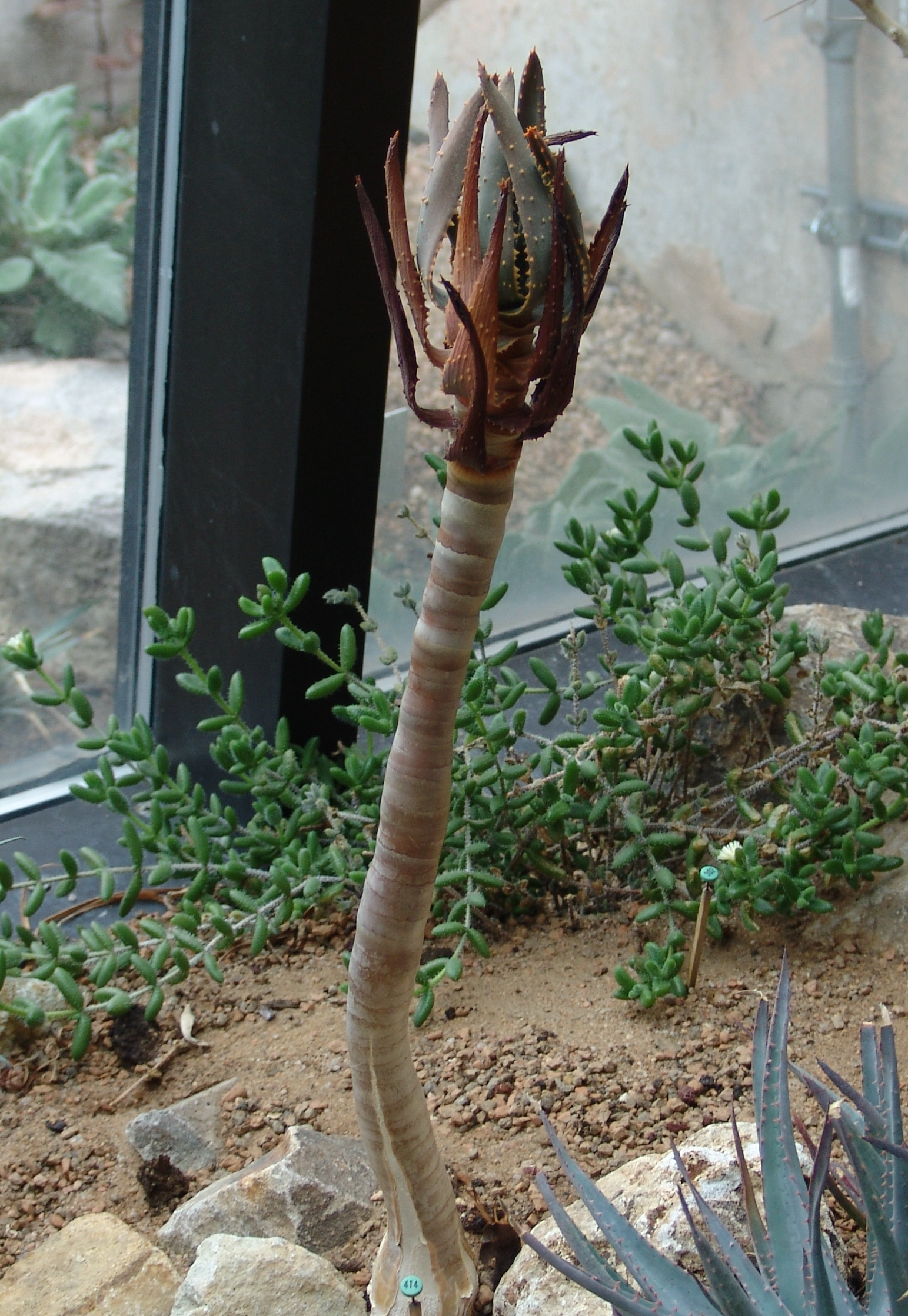 Denver Botanical Garden IUCN 2008 Red List Status Vulnerable